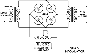 Quad modulator - 6H6 tubes